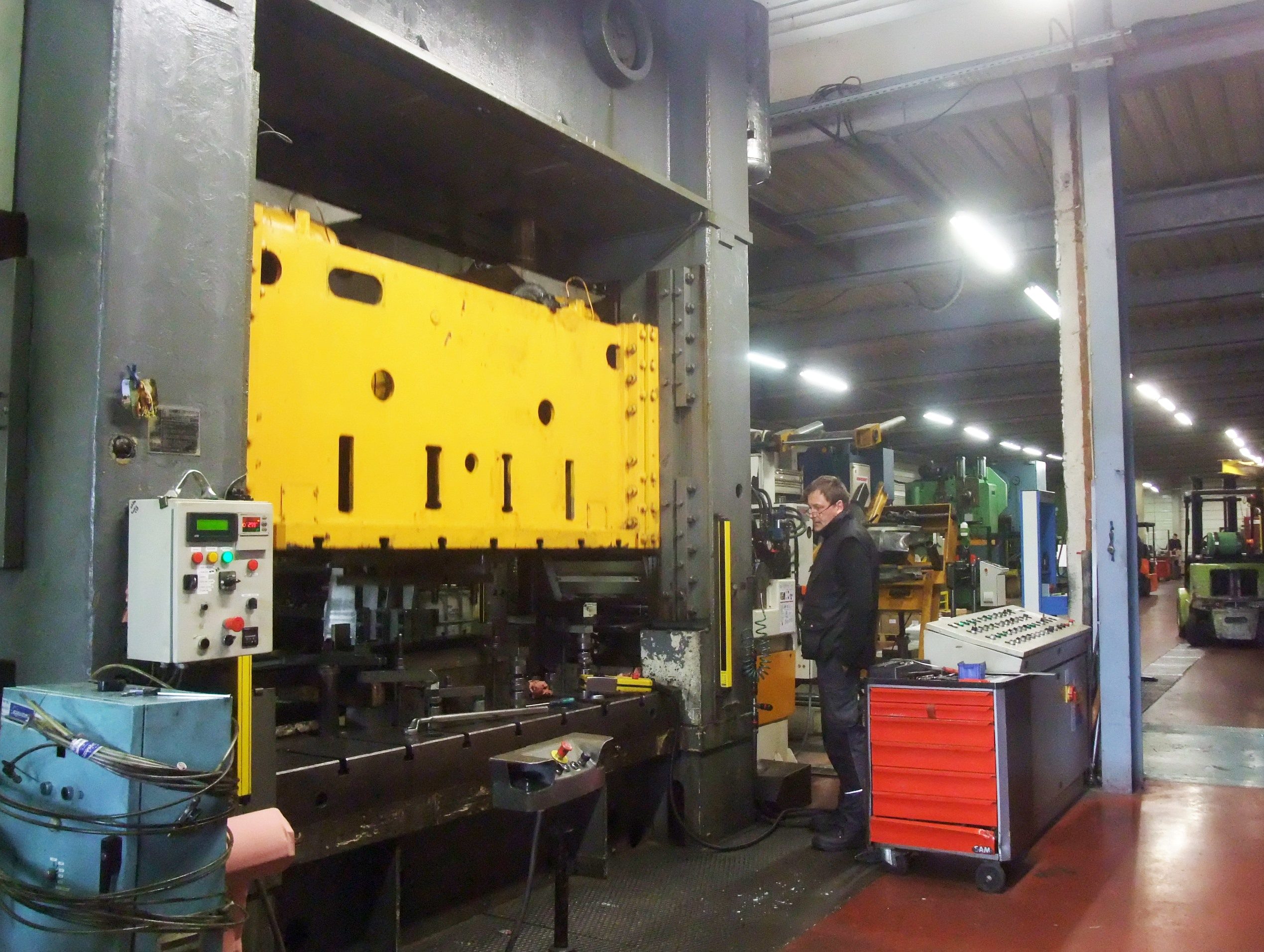 Boulieu Emboutimétal presse jaune